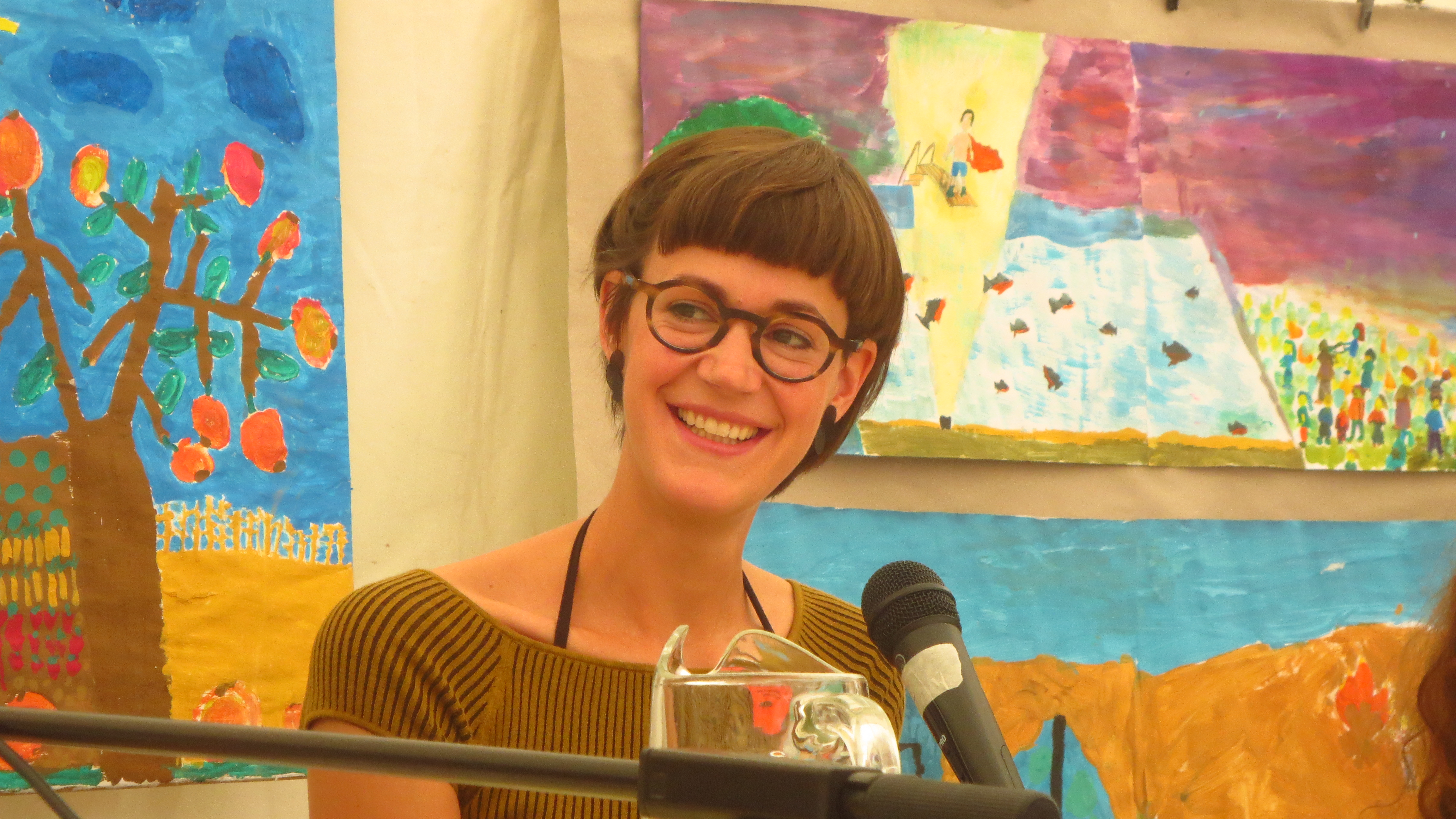 Kaatje Vermeire on September 13th, 2015, at the Cultural Center "Gelbe Villa" in Berlin, where she participated in an event of the Children´s and Young Adult Program of the 15th international literature festival berlin.